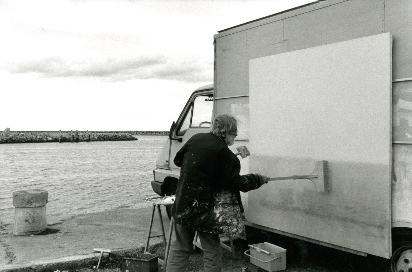 Piet Moget peint